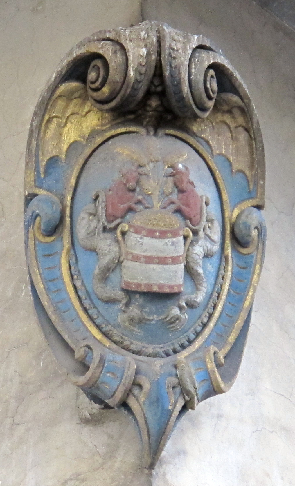 Loggia del pesce in p. dei ciompi, stemma sulla fiancata